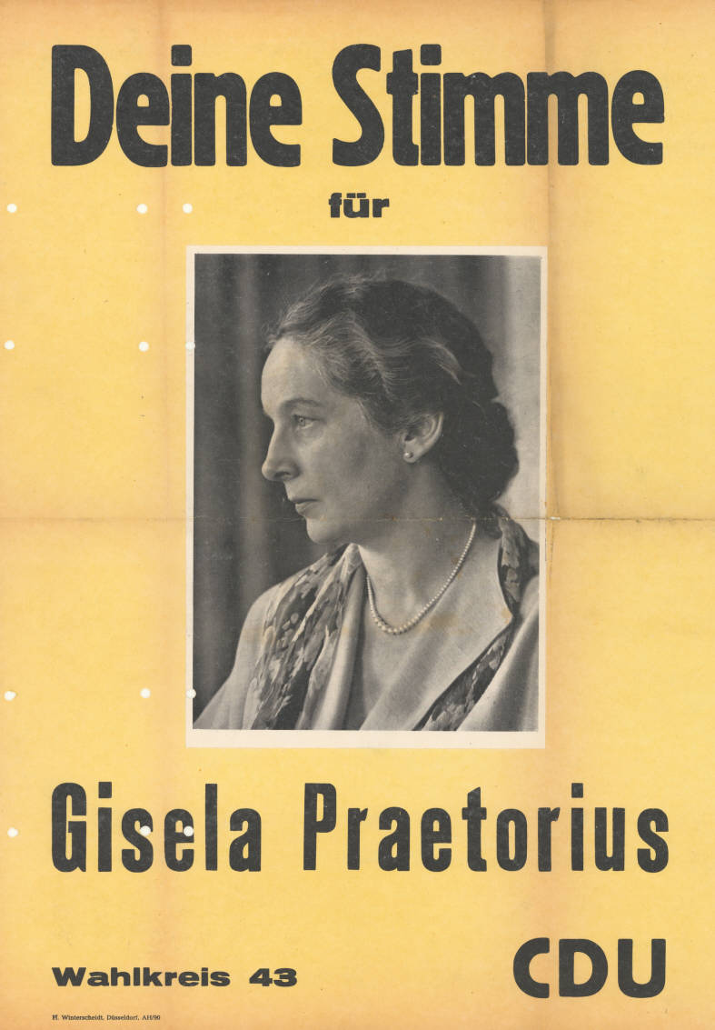 Deine Stimme für Gisela Praetorius Wahlkreis 43 CDUAbbildung:PorträtfotoKommentar:Das Foto ist aufgeklebt.Plakatart:Kandidaten-/Personenplakat mit PorträtDrucker_Druckart_Druckort:H. Winterscheidt, Düsseldorf, AH/90Objekt-Signatur:10-009 : 249.5Bestand:Landtagswahlplakate Nordrhein-Westfalen (10-009)GliederungBestand10-18:Landtagswahlplakate Nordrhein-Westfalen (10-009) » Landtagswahl am 18.6.1950 » CDU » mit PorträtfotoLizenz:KAS/ACDP 10-009 : 249.5 CC-BY-SA 3.0 DE